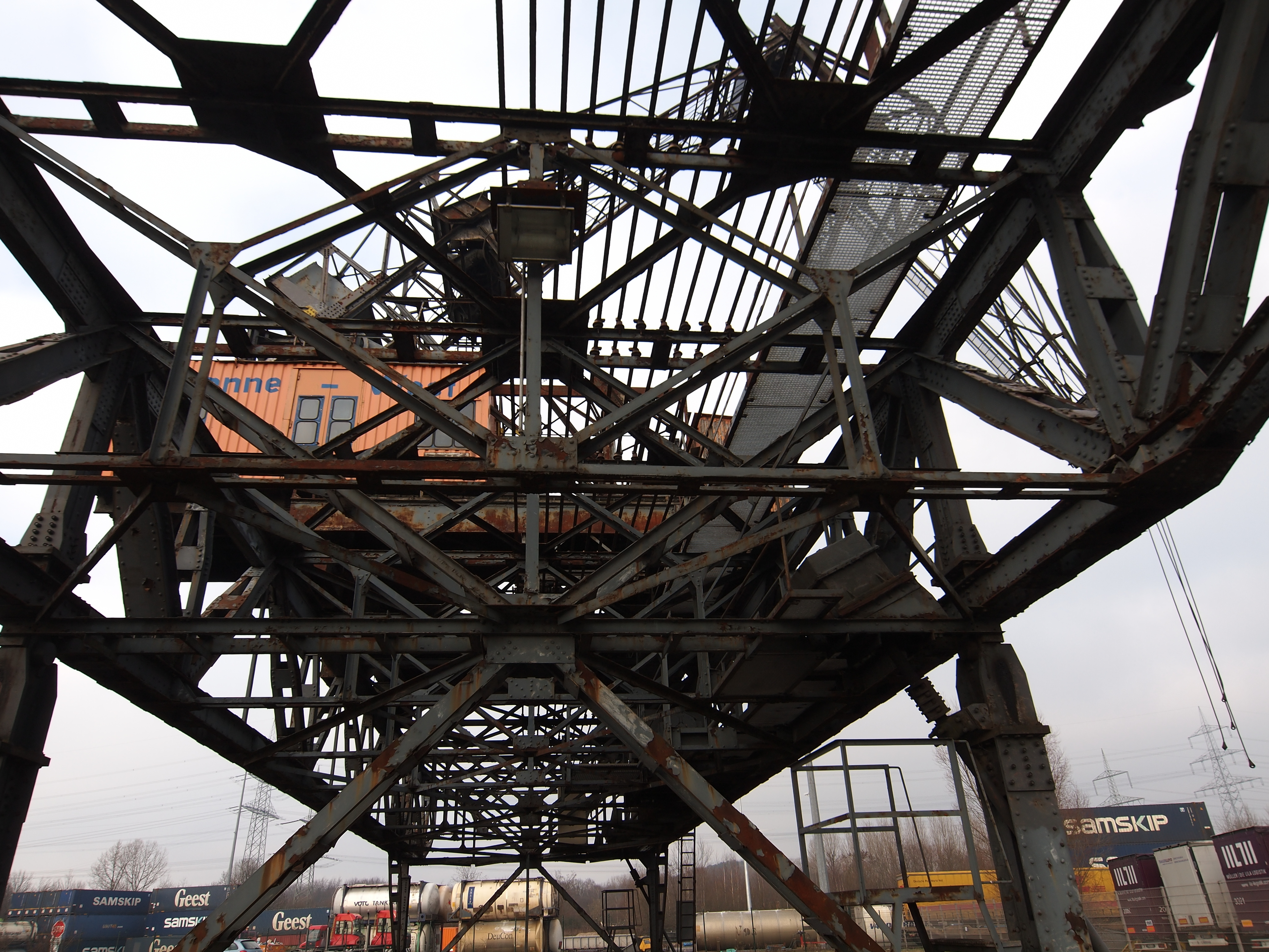 Ehemaliger Hafenkran eines früheren Hafenbeckens im Hafen Herne West am Rhein-Herne-Kanal, Denkmal in Herne-Wanne, Am Westhafen